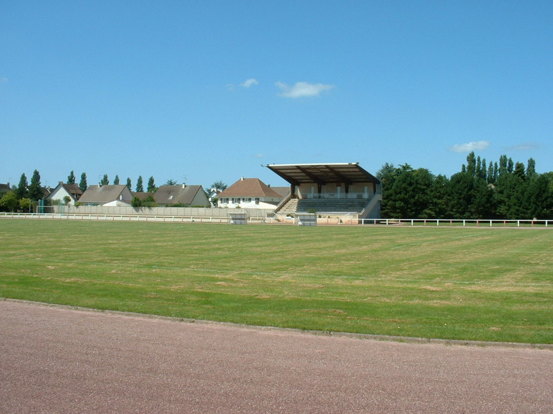 Terrain d'Honneur du Stade Alphonse Laurent de Carentan